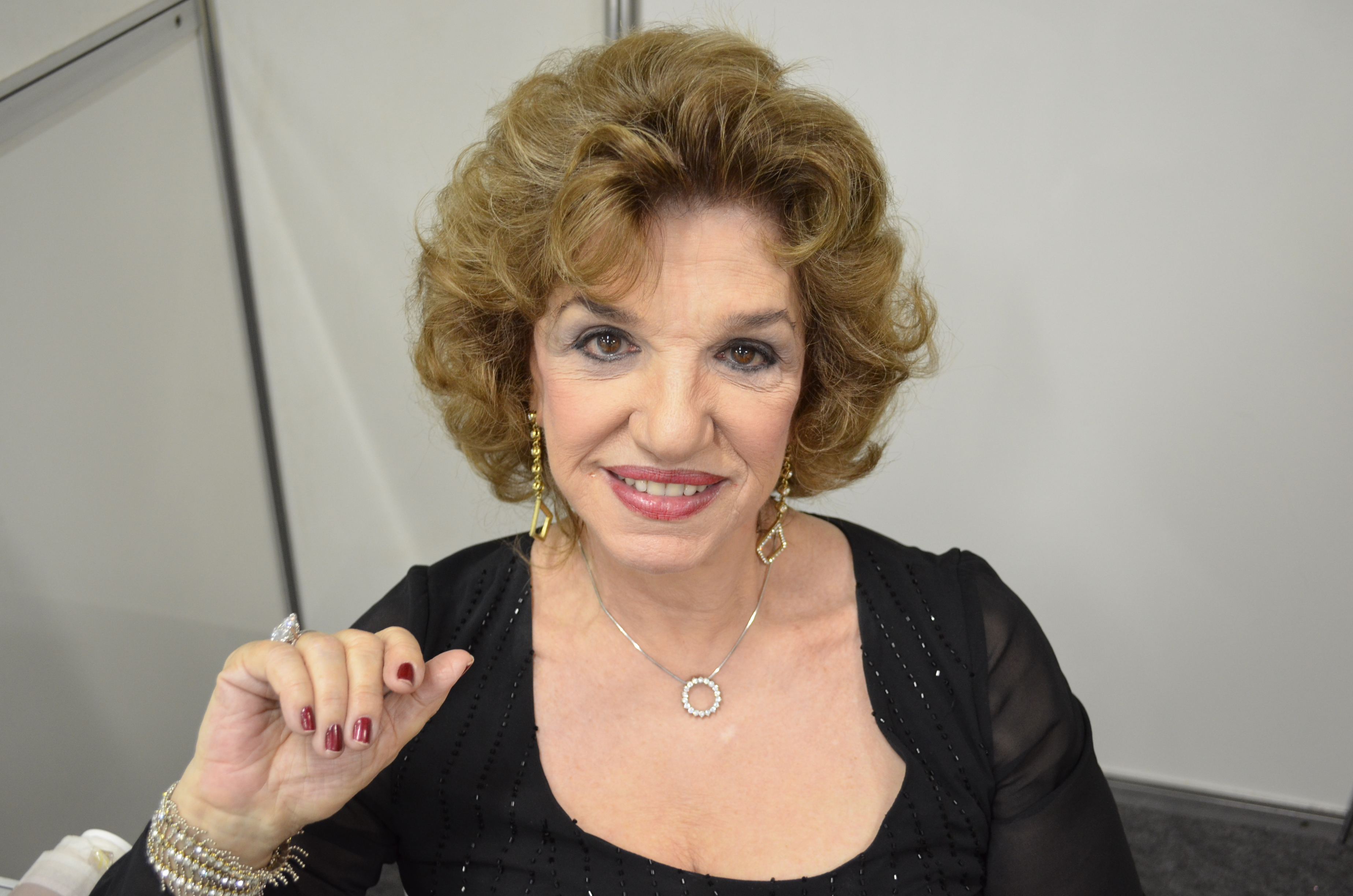 Adelaide Chizzo, cantora